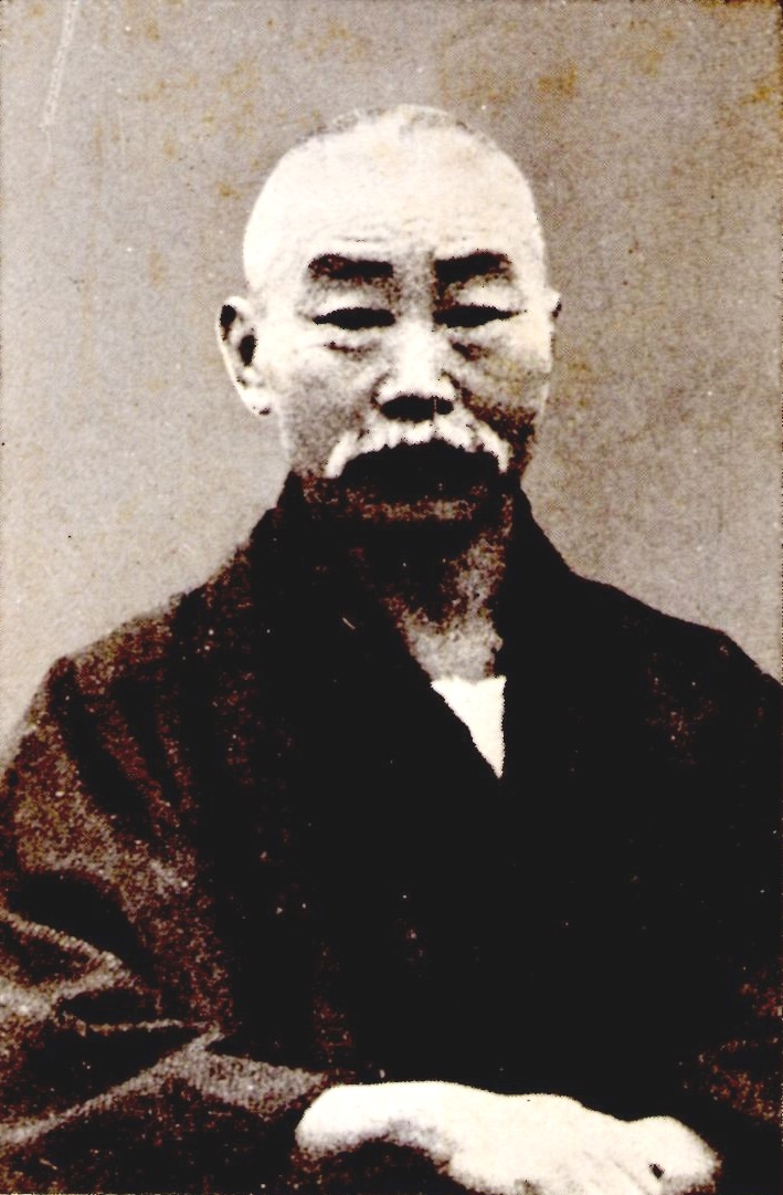 『明治文壇回顧録』（昭和29年、河出文庫）に掲載